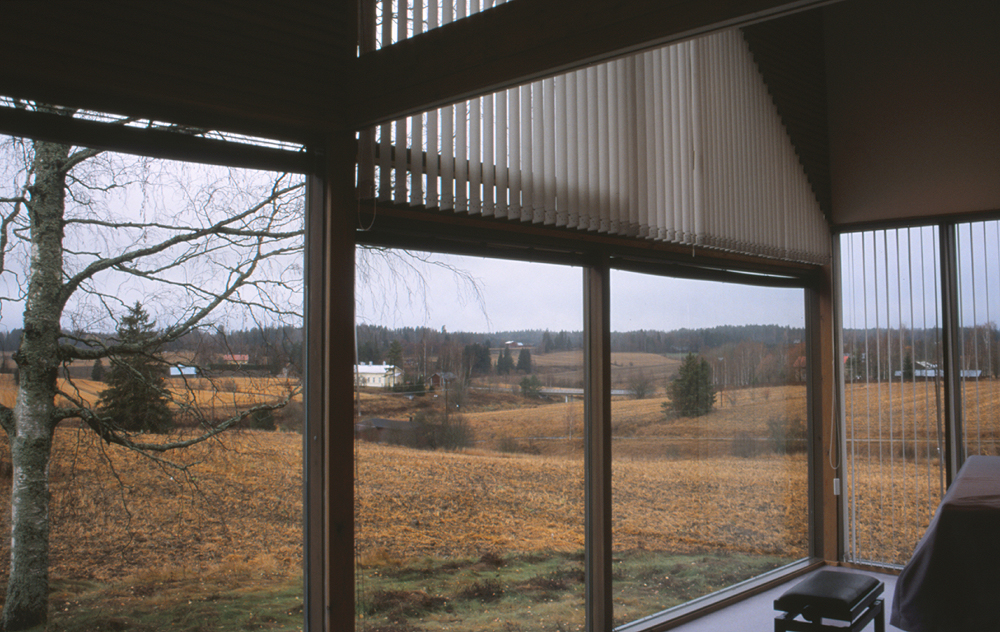 Seurakuntakeskus Pornainen. Näkymä salista. Pornainen, Finland